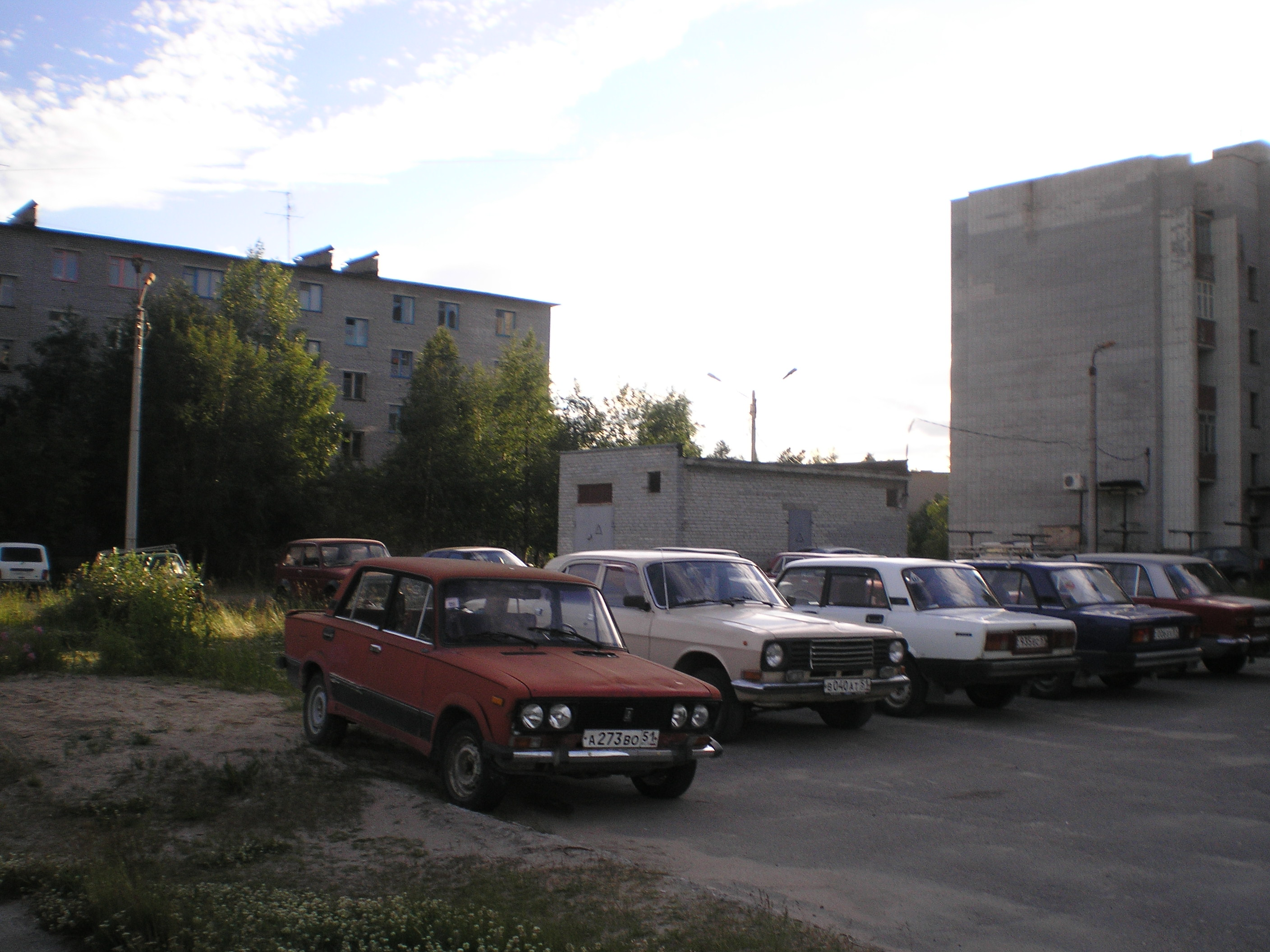 Жилые дома в Ёнском. 2010 г.